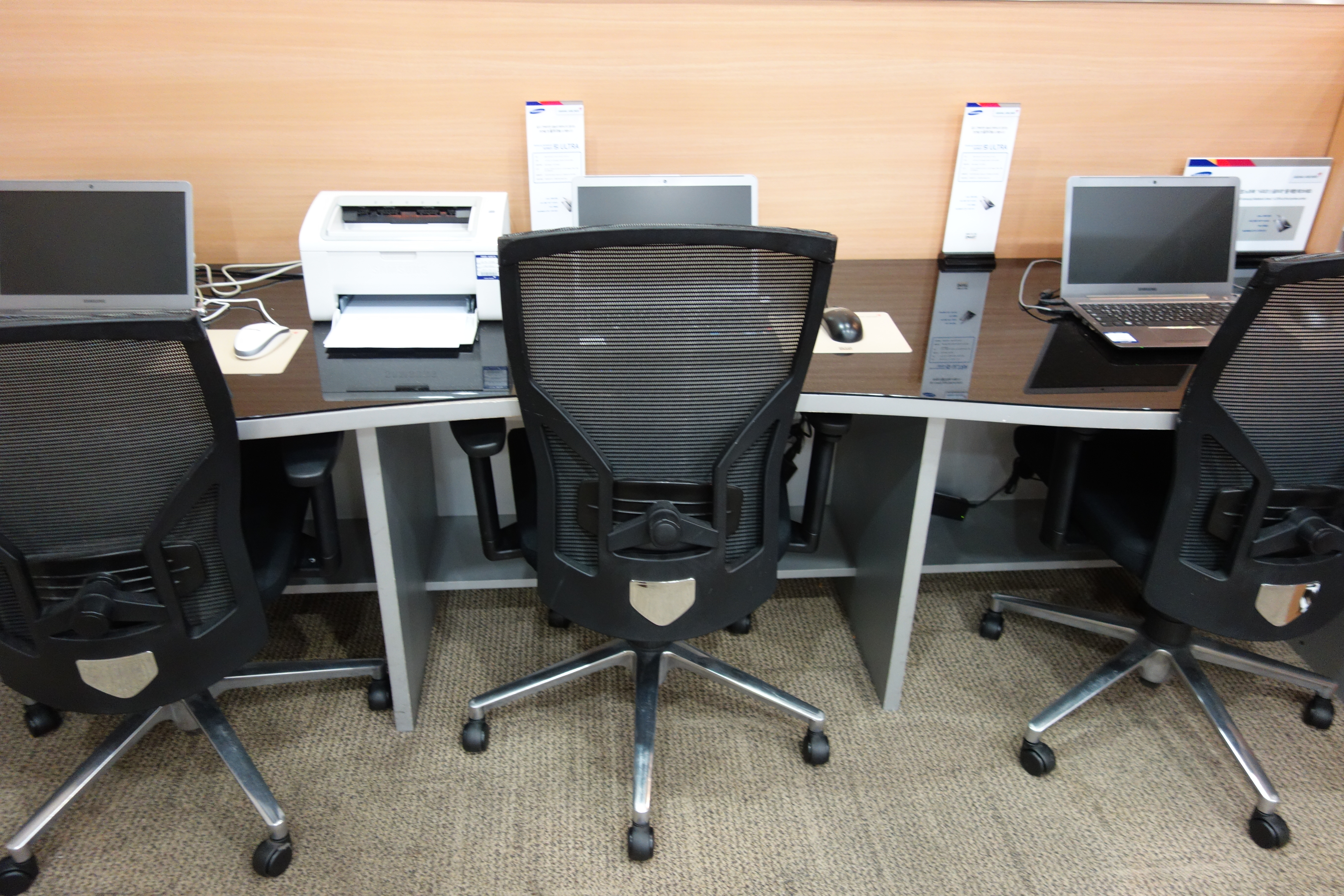 近海国際空港 アシアナラウンジ（ビジネスコーナー）